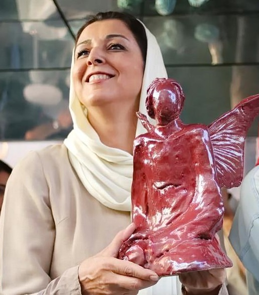 نادره حکیم الهی در حراج خیریه رشت